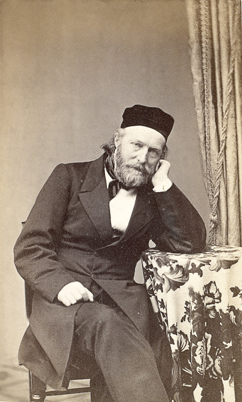 Caption: Daniel Cornelius Danielssen (1815-1894).